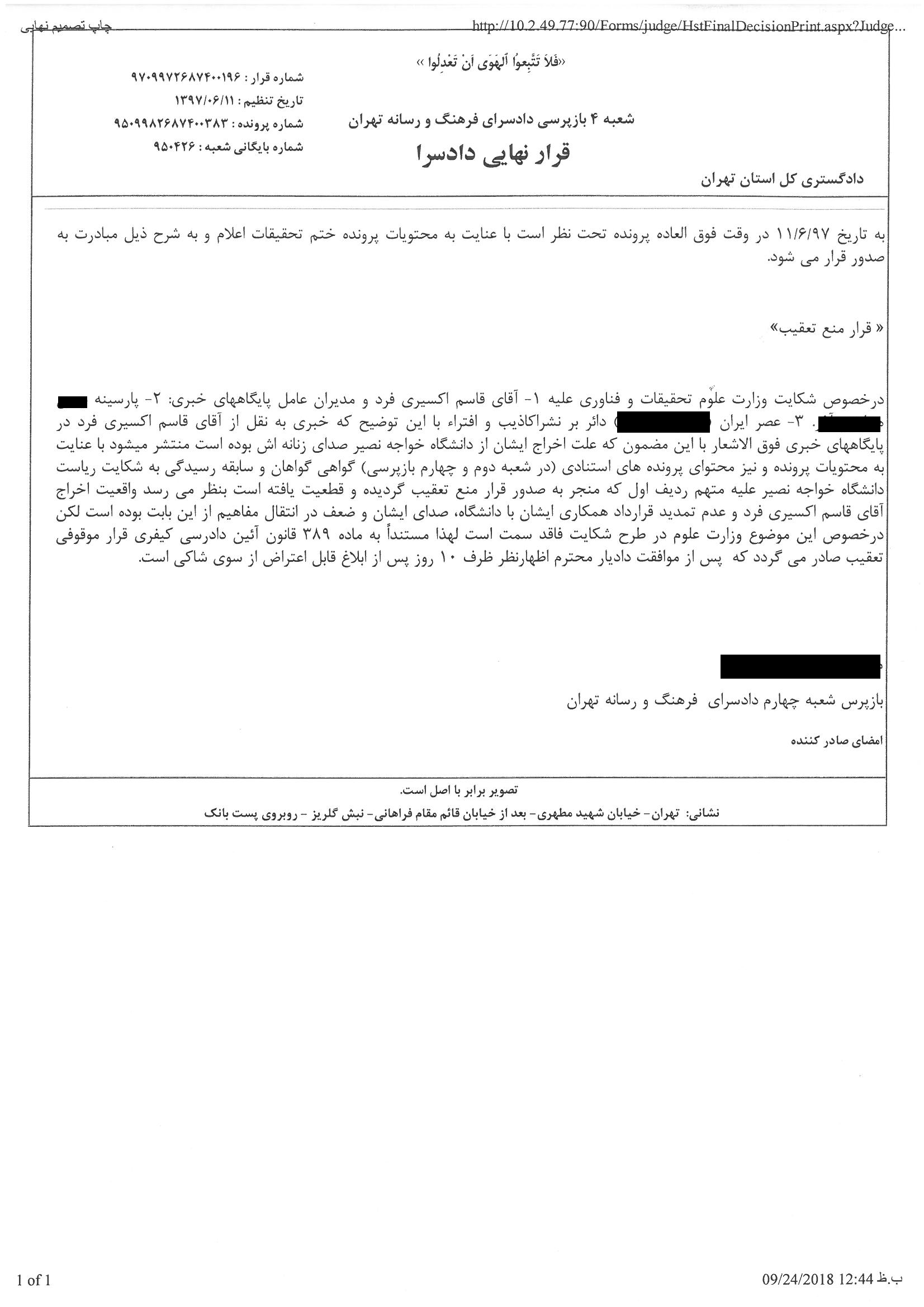 قرار اکنون قطعی شعبه چهارم دادسرای فرهنگ و رسانه